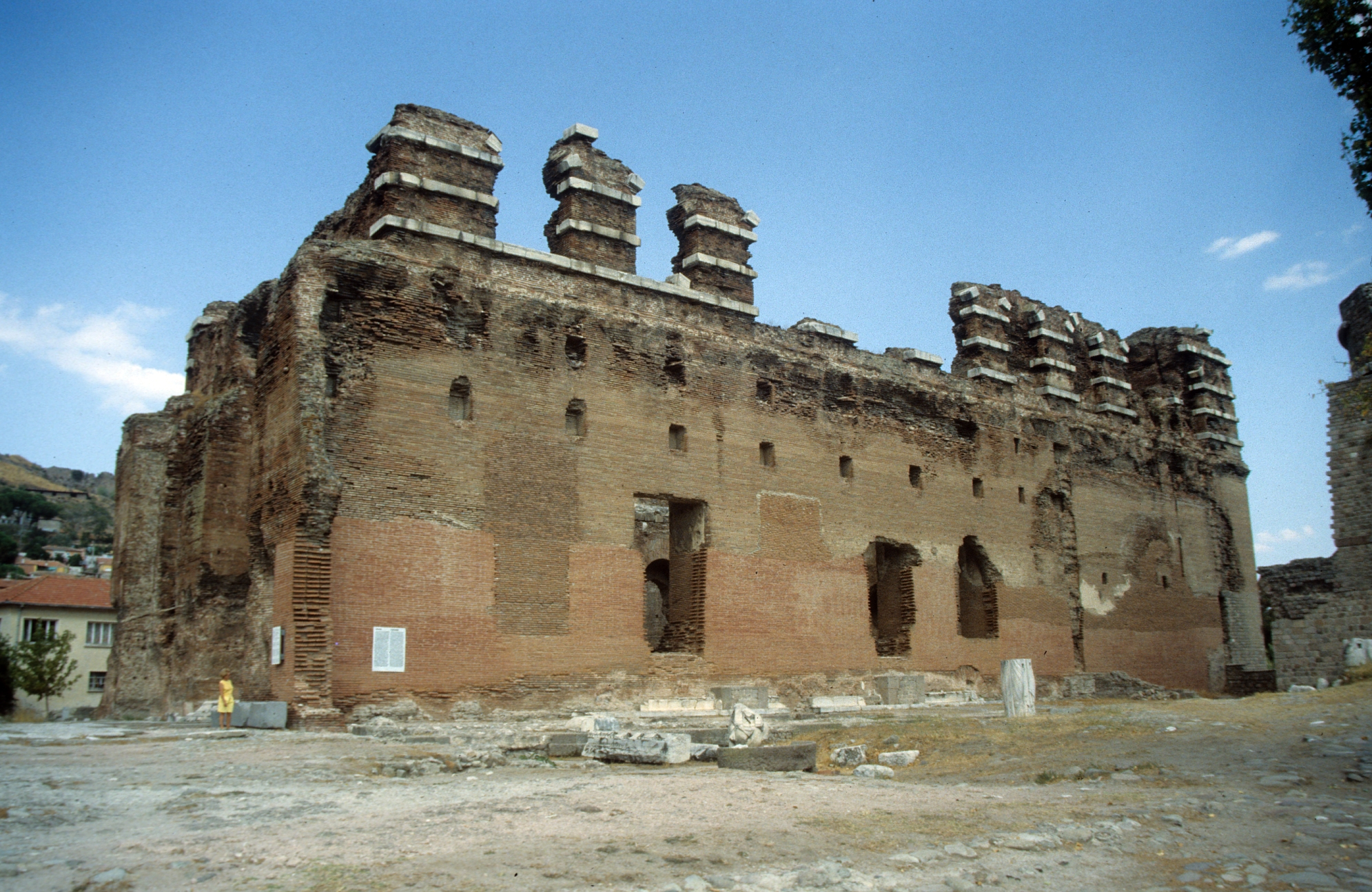 Pergamon, Westtürkei, Rote Halle von Süden